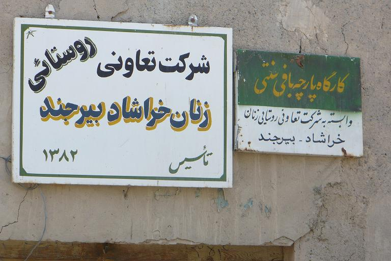 این شرکت در سال 1382 تاسیس گردید